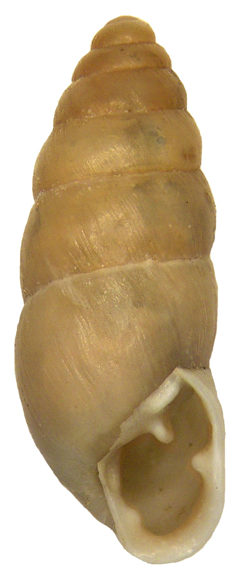 Familie: Enidae Groesse: 9-12 x 4-4,5 mm Verbreitung: südliches Europa Oekologie: trockene, offene und kalkhaltige Standorte Fundort: Italien, Adria, Caorle leg.det. U.Schmidt, 1985 Photo: U.Schmidt, 2007